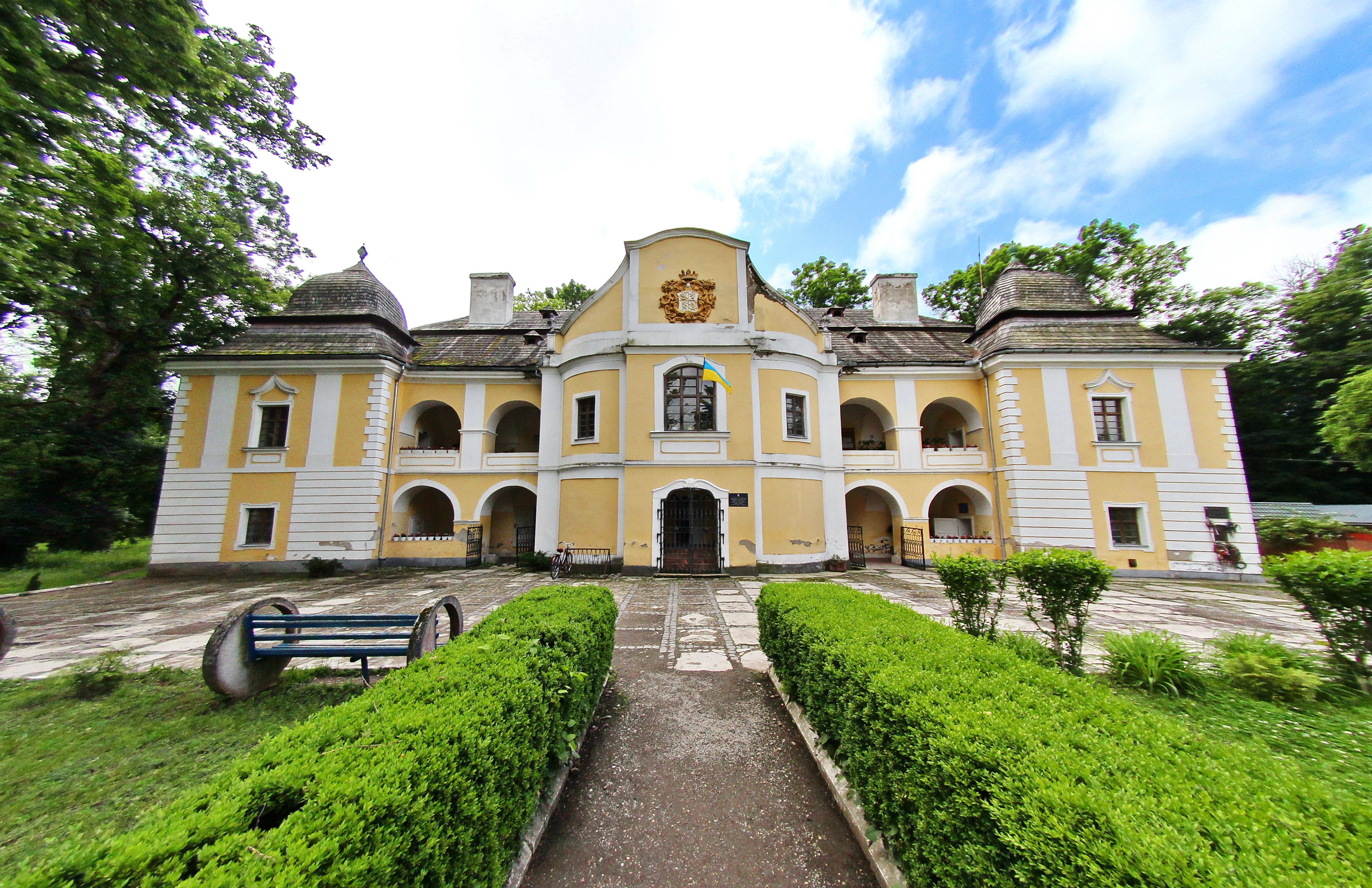 Палац барона Перені (мур.), Виноградів, вул. Копанська, 10